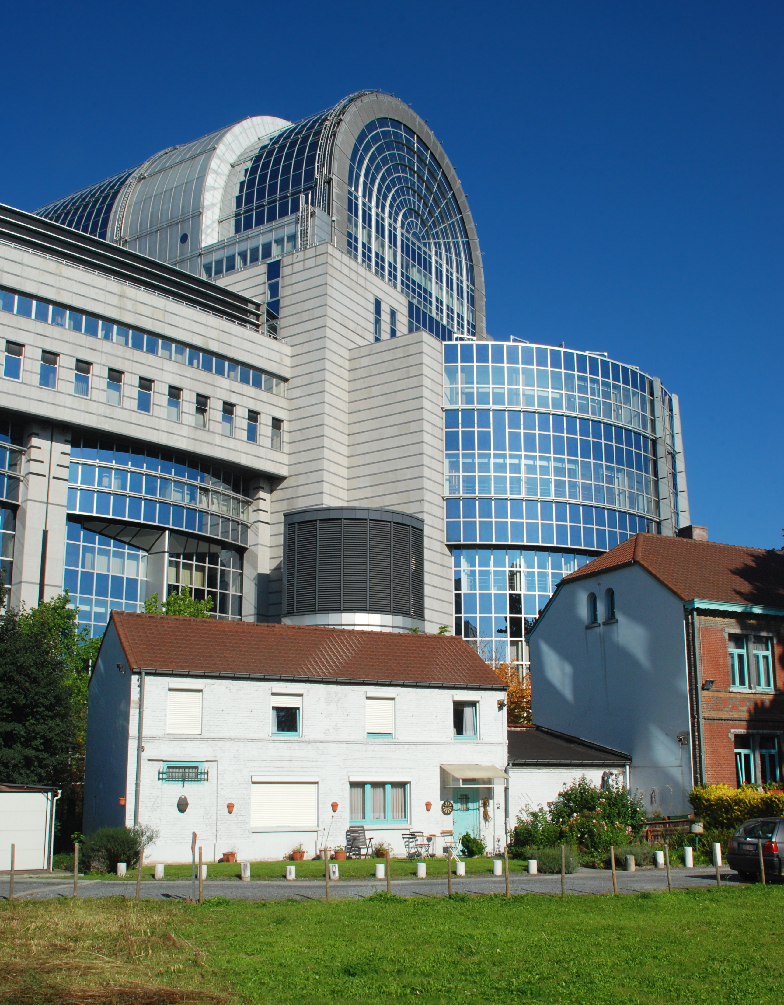 Belgique - Bruxelles - Parlement européen - arrière du bâtiment Paul-Henri Spaak (Architecture postmoderne en Belgique - Atelier d'architecture de Genval - 1987-2004)